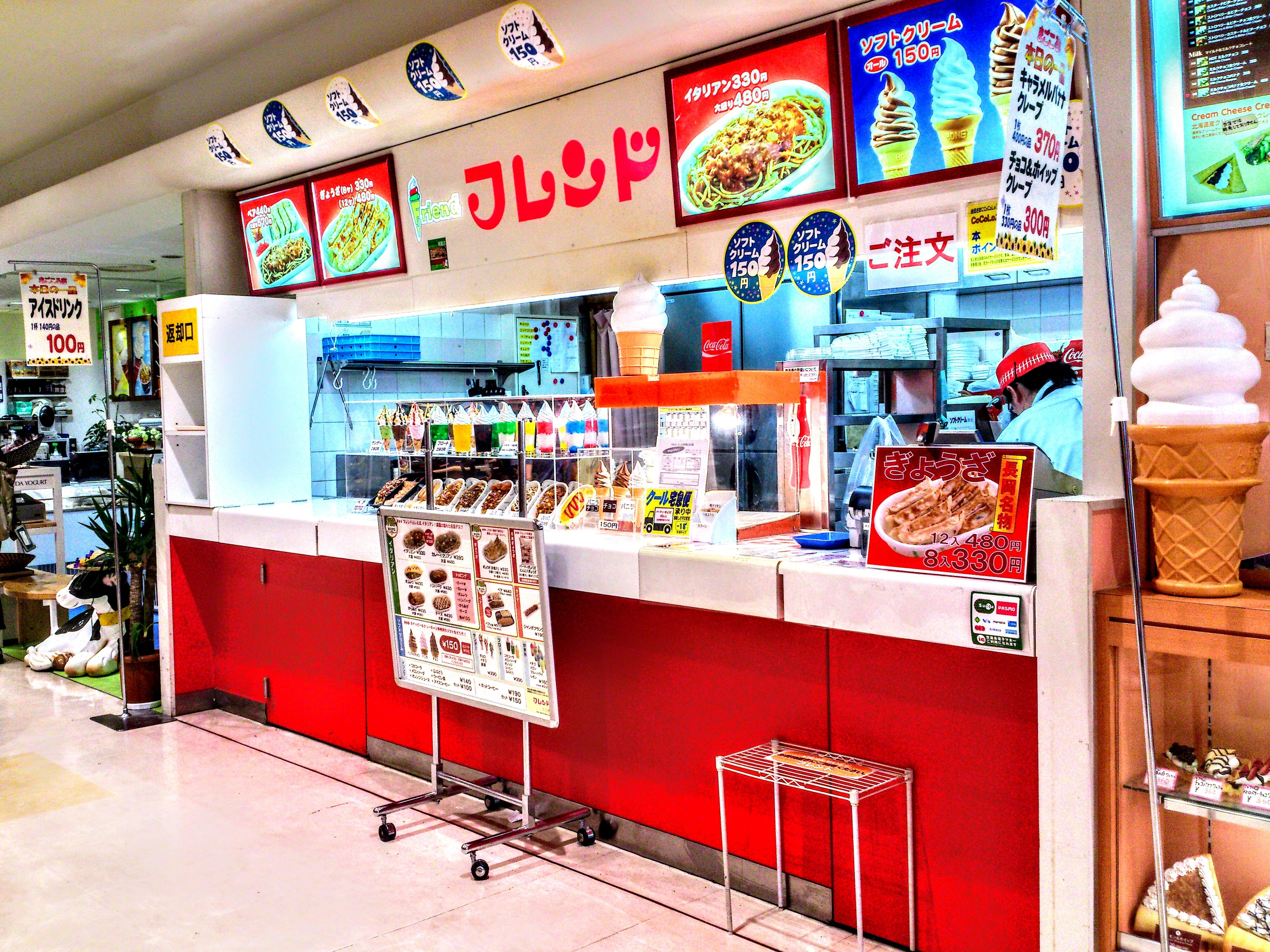 フレンド CoCoLo長岡店